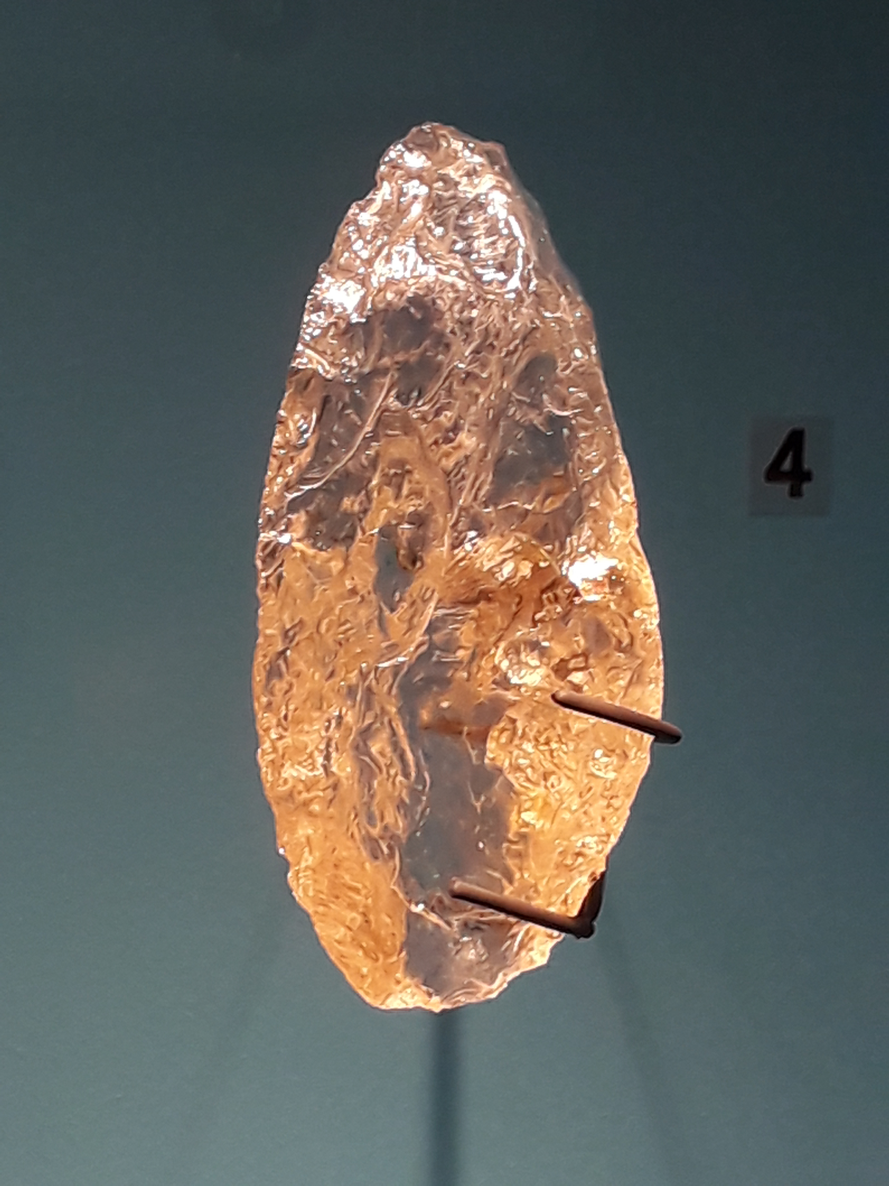 Racloir en cristal de roche. Provenant de l'abri des Merveilles (Dordogne), France. Période : paléolithique moyen. Musée d'archéologie nationale - Domaine national de Saint-Germain-en-Laye. On ignore si cet objet était véritablement utilisé comme outil ou s'il a été créé à des fins purement artistiques. Photographié à l'exposition "Néandertal, l'expo" au musée de l'Homme à Paris en avril 2018.